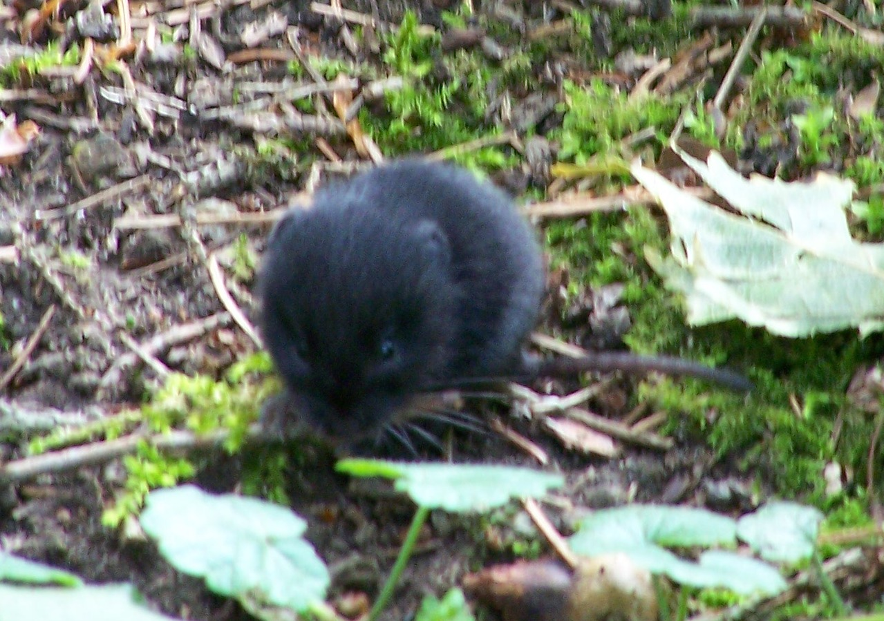 juvenile Bank vole, Myodes glareoulus; Germany, Cologne